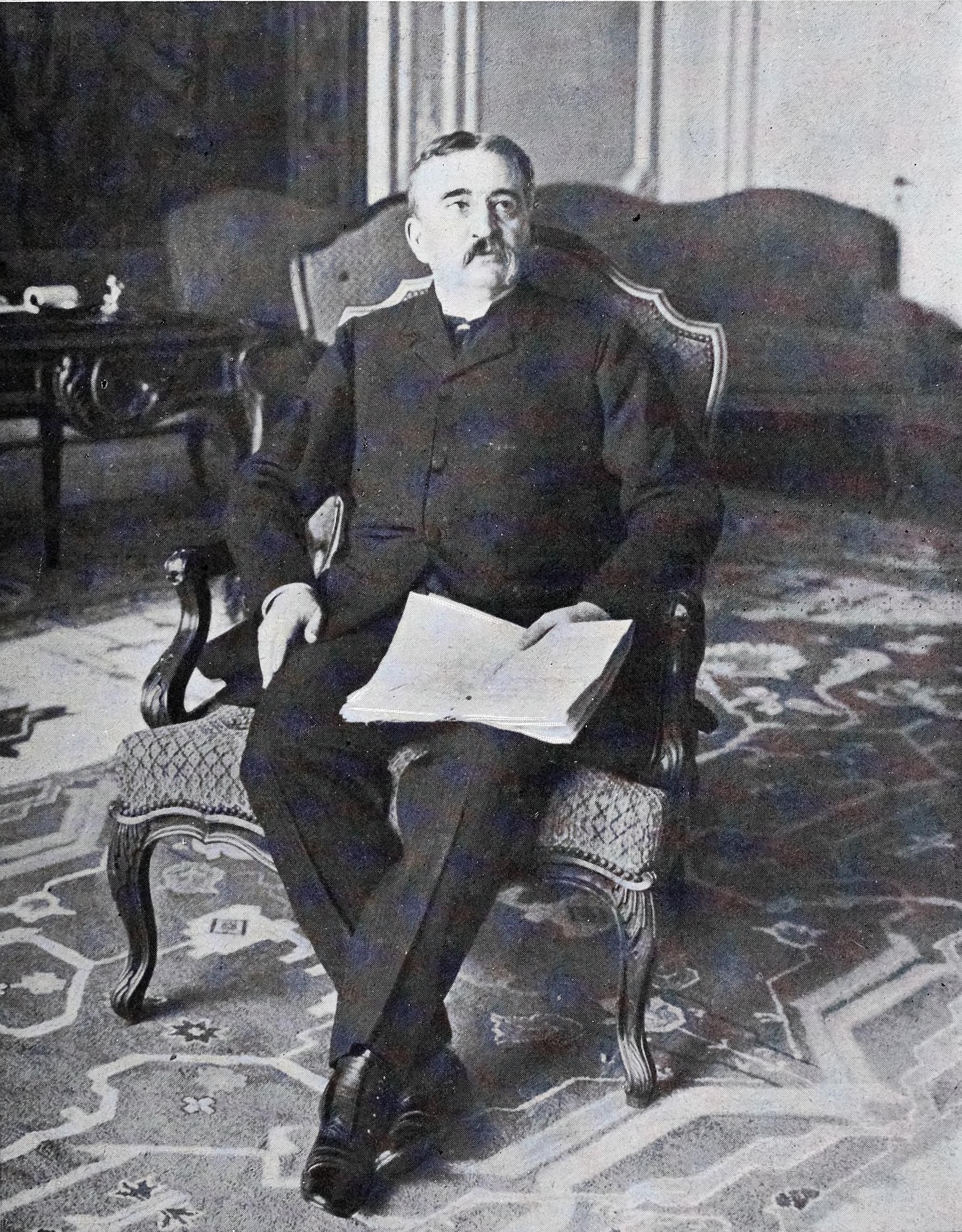 Mr. Pichon, ministro de Negocios Extranjeros de Francia. Fot. Goñi